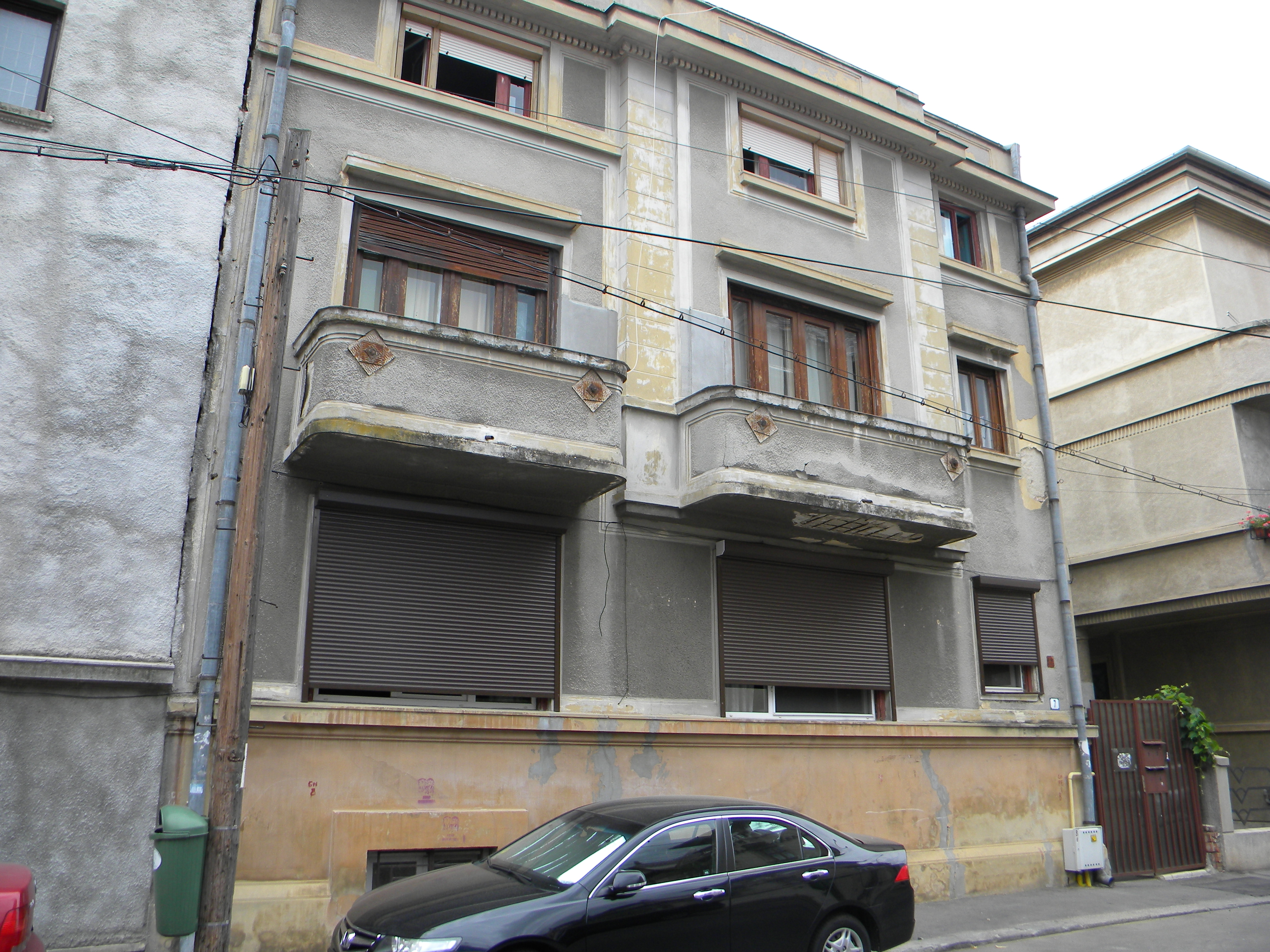 Bucuresti, Romania, Casa pe Str. Vasile Alecsandri nr. 7; B-II-m-B-17942